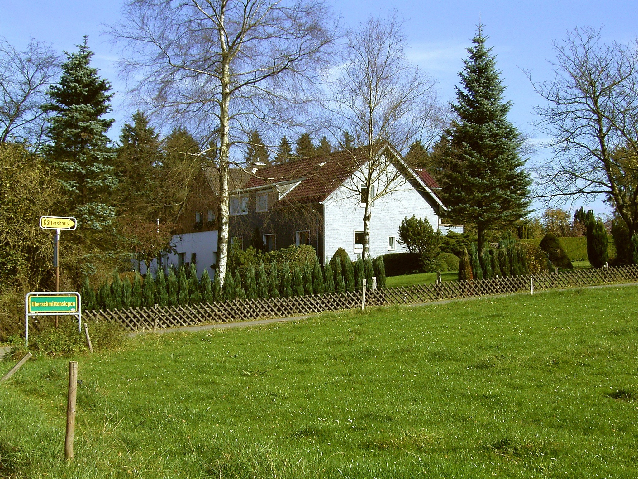 Radevormwald